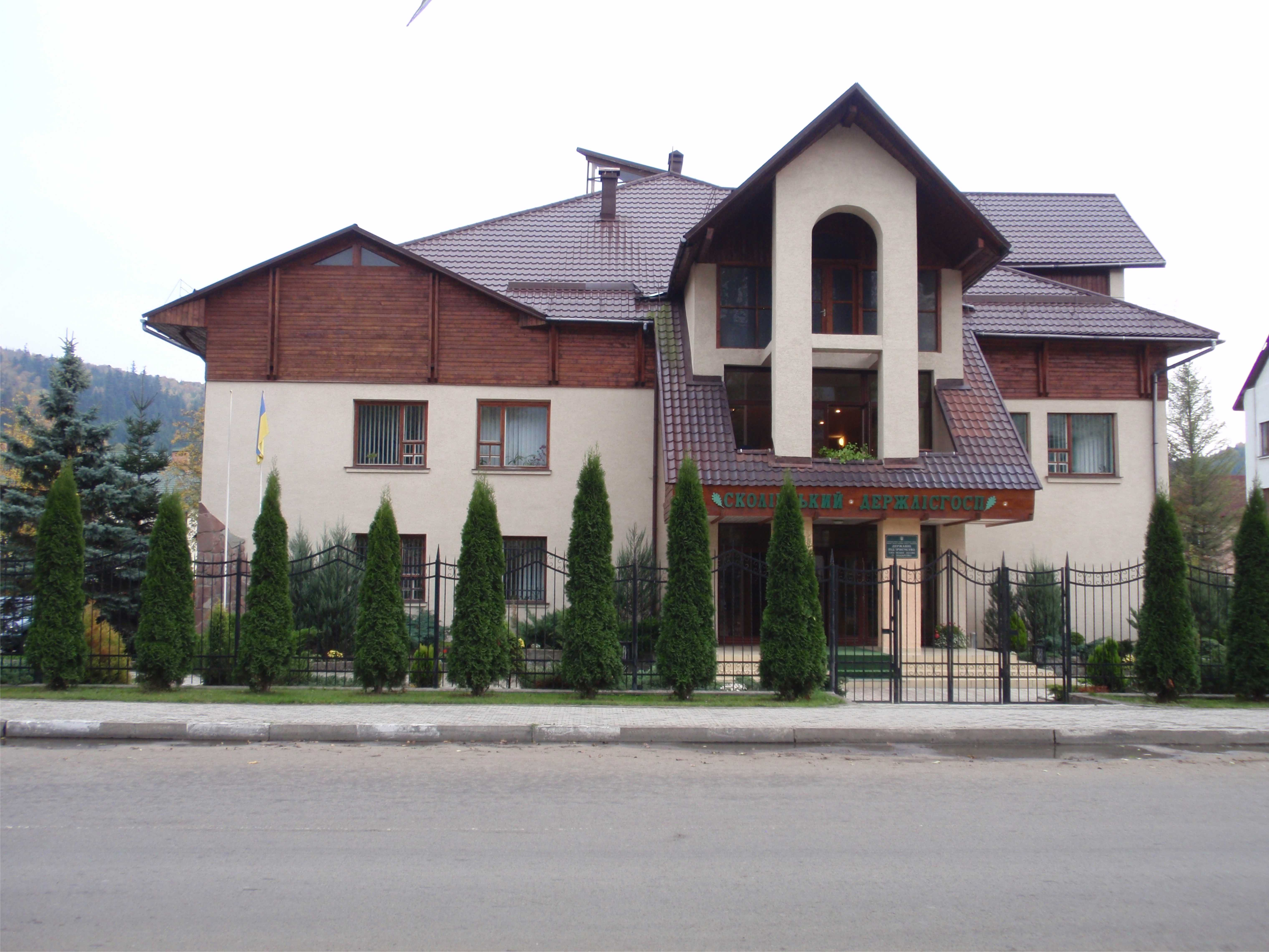 Офіс Сколівського Держлісгоспзагу